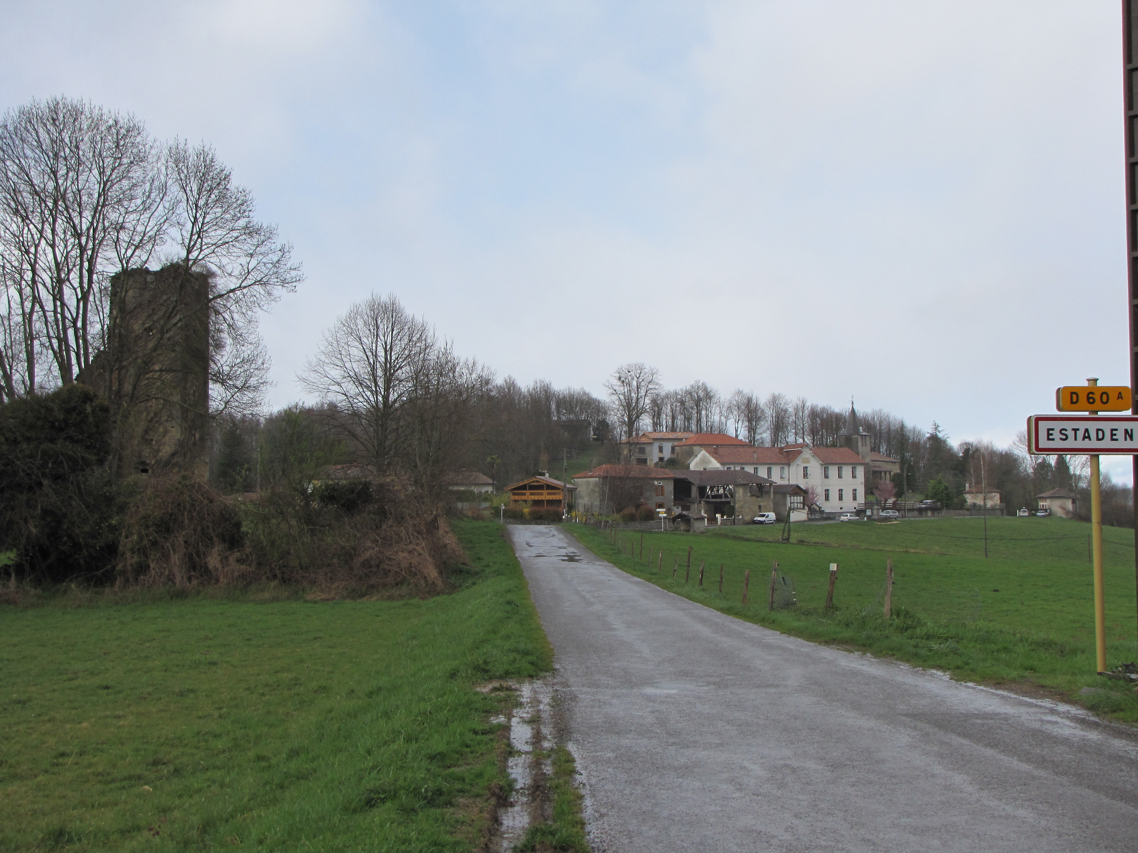 Estadens